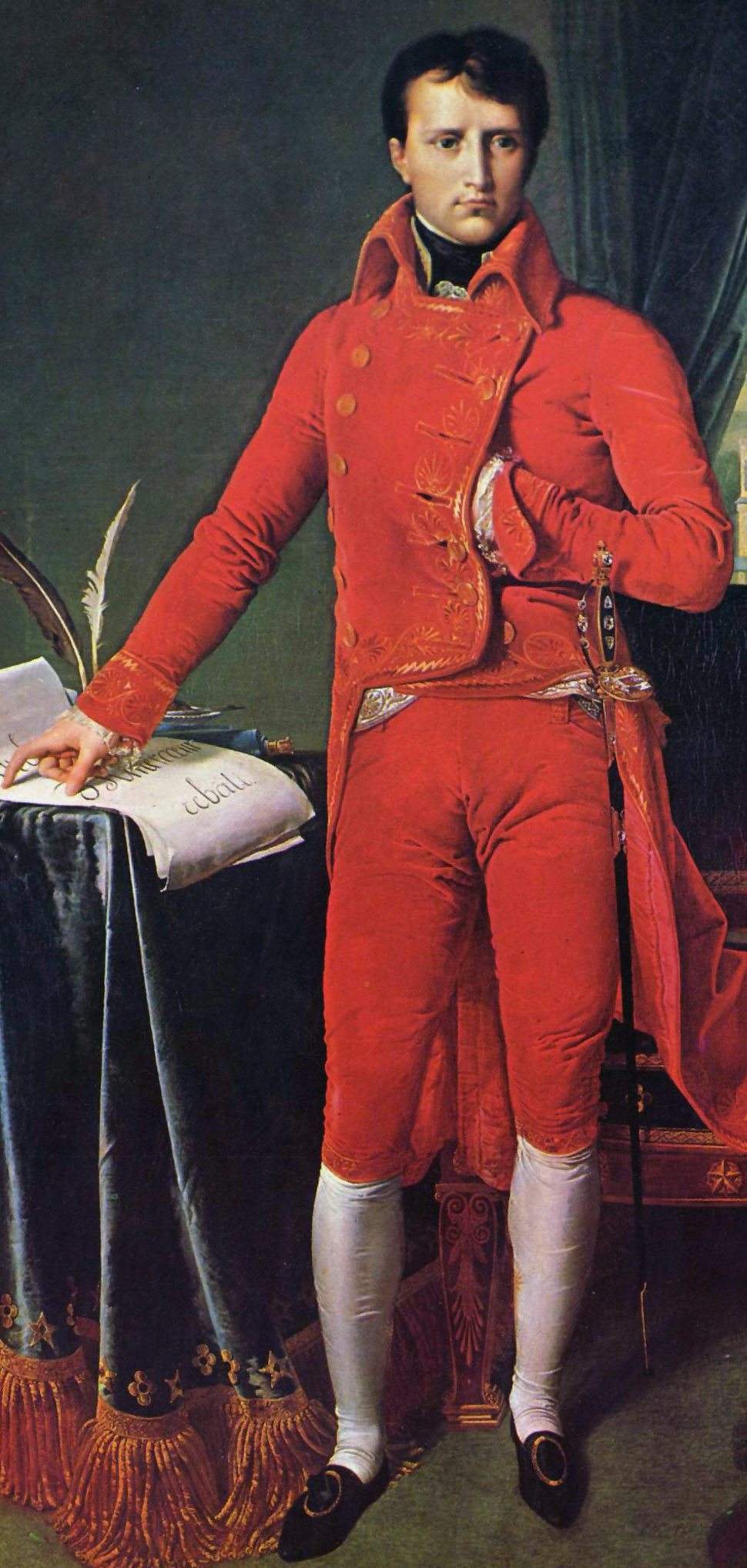 Porträt Napoleon Bonapartes als Erster Konsul